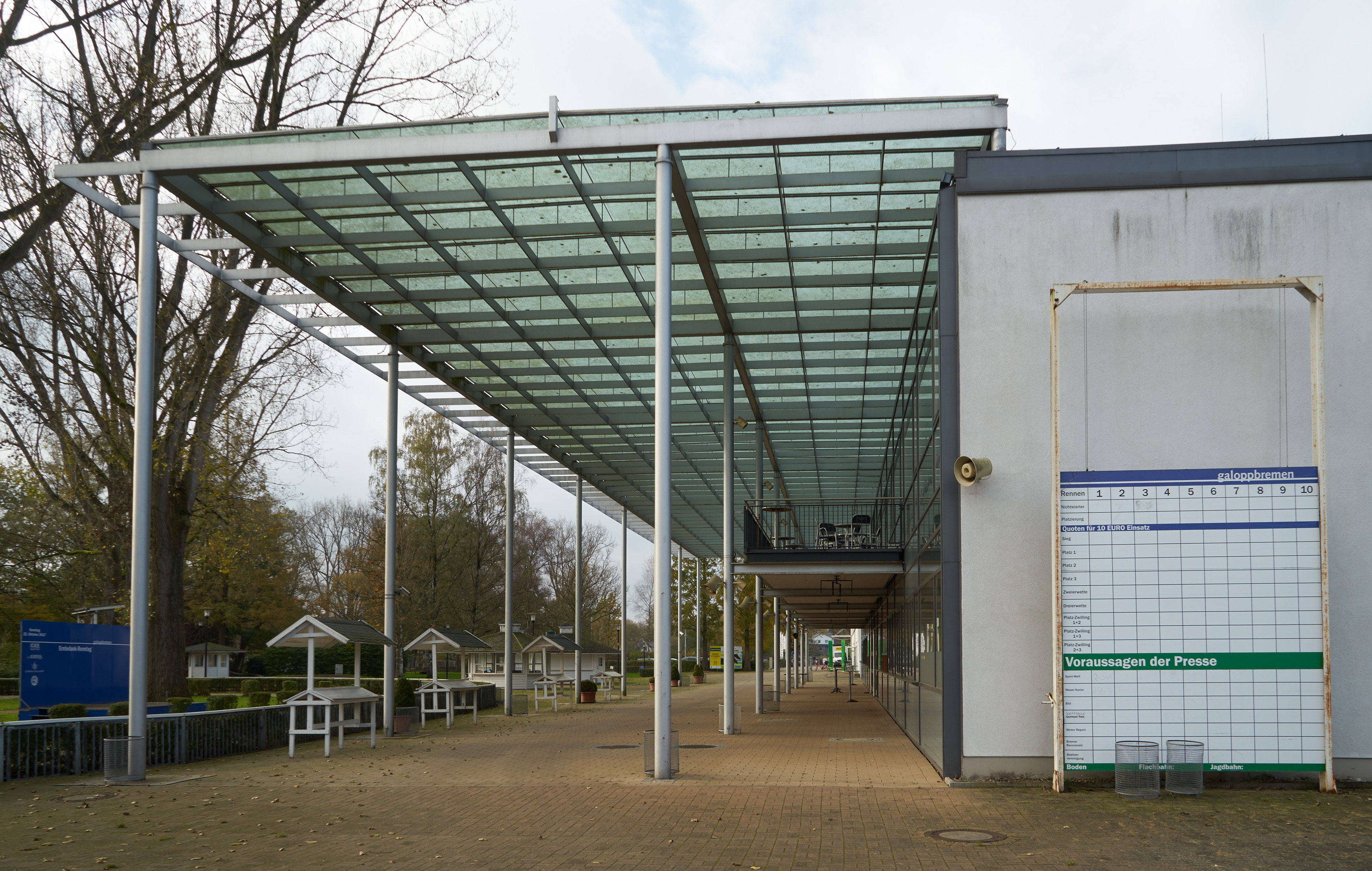 Galopprennbahn Bremen. Wetthalle mit Gastronomie und Turf-Lounge in der oberen Etage